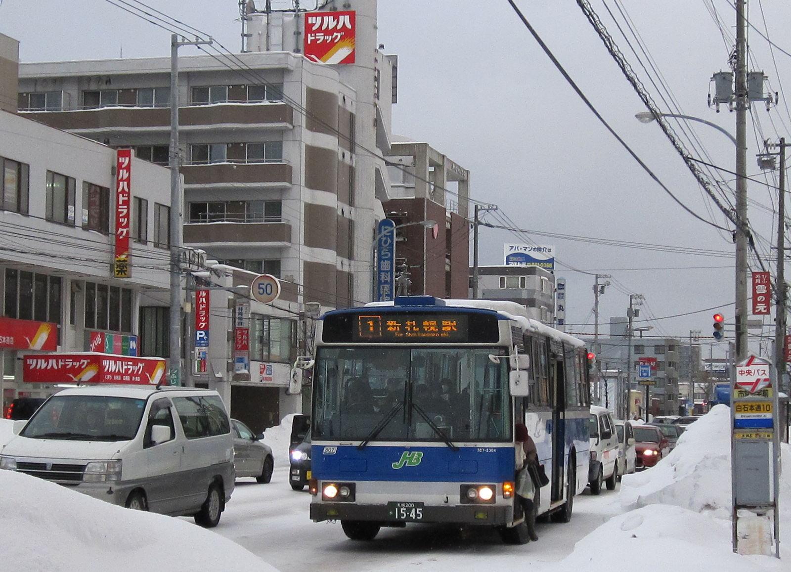 JR北海道バス新札幌駅行